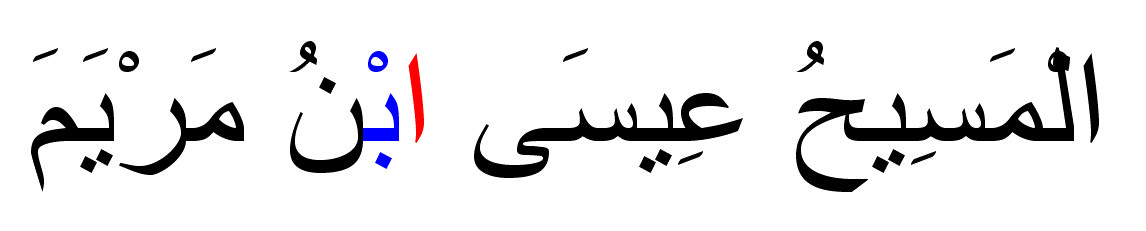 Арабская надпись Аль-Масих 'Иса бну Марйама, означающая "Мессия Иисус сын Марии". Красным выделена буква "алиф", которая не произносится, а синим - буква "ба", которая читается чётко и твёрдо.